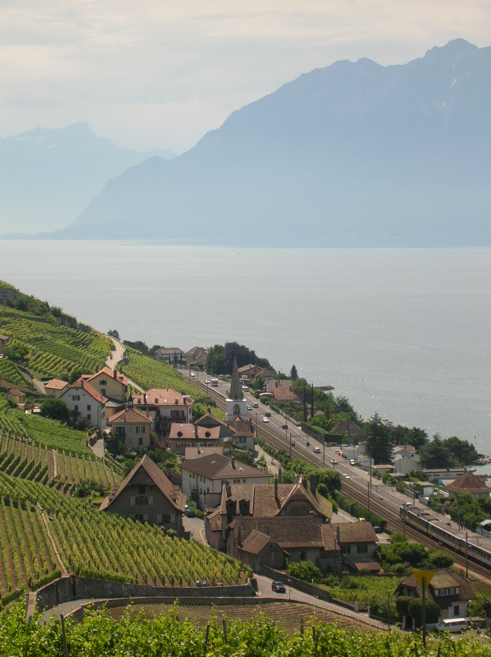 Surplombant les vignobles de la Villette (Lavaux) et le lac Léman.